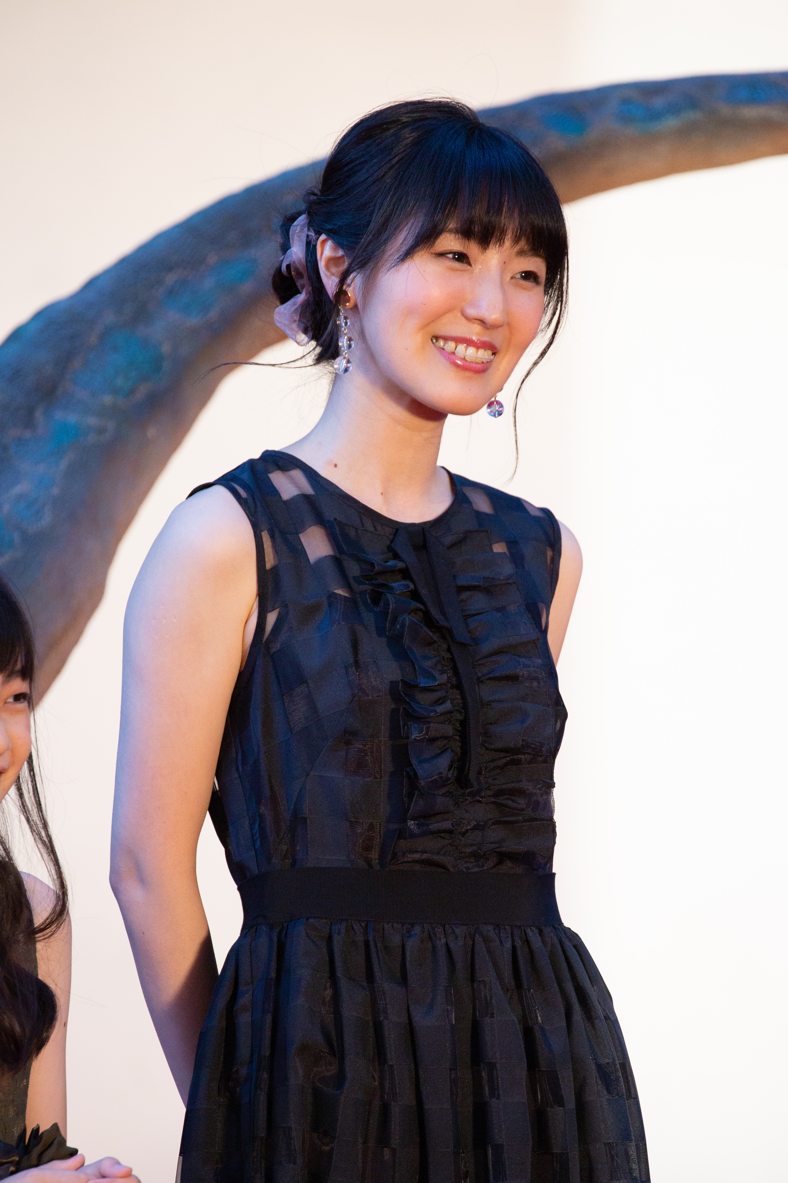 ジュラシック・ワールド/炎の王国 ジャパン・プレミア レッドカーペット 石川由依